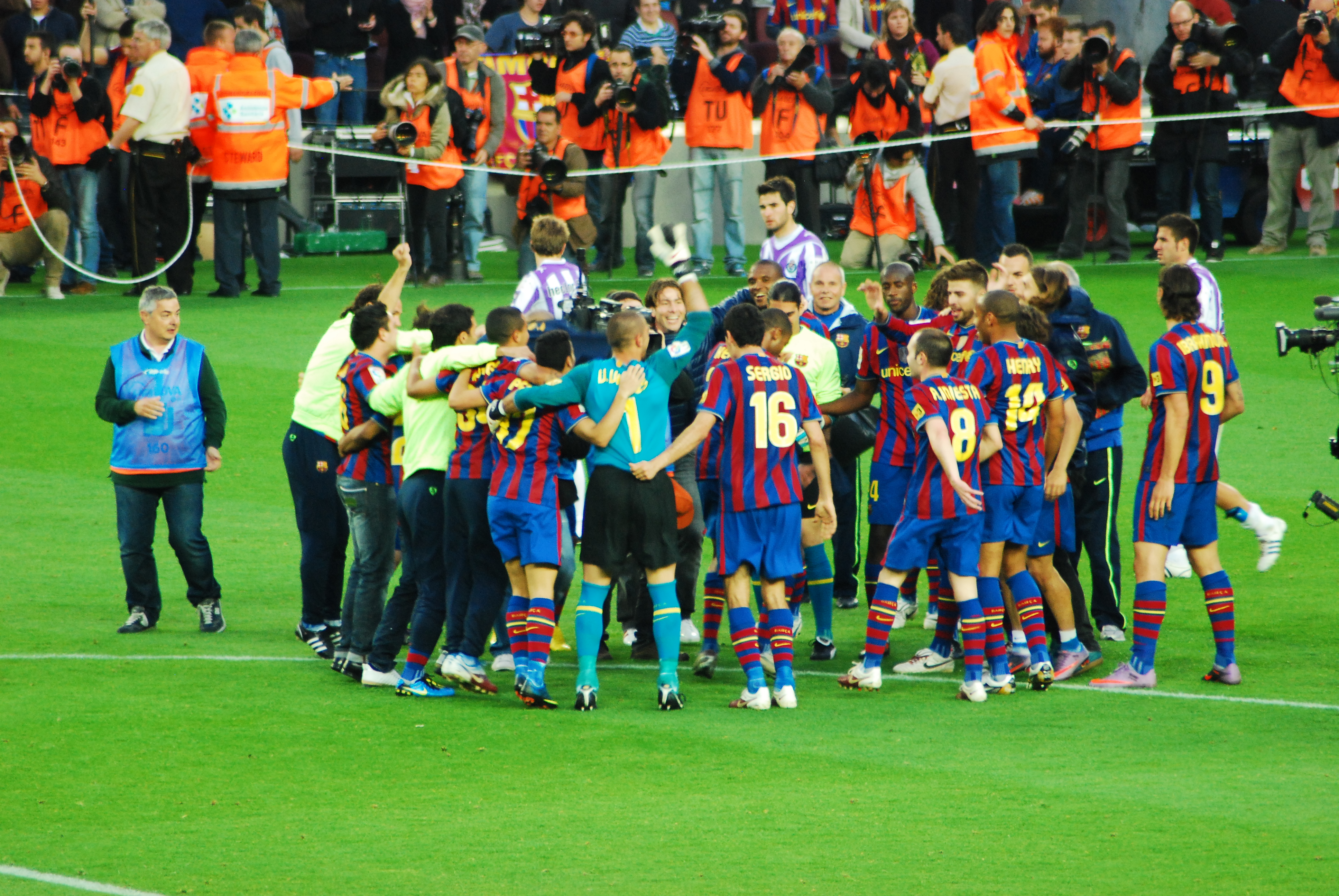 Los jugadores del FC Barcelona celebran la obtención del titulo liguero de la temporada 2009-2010.